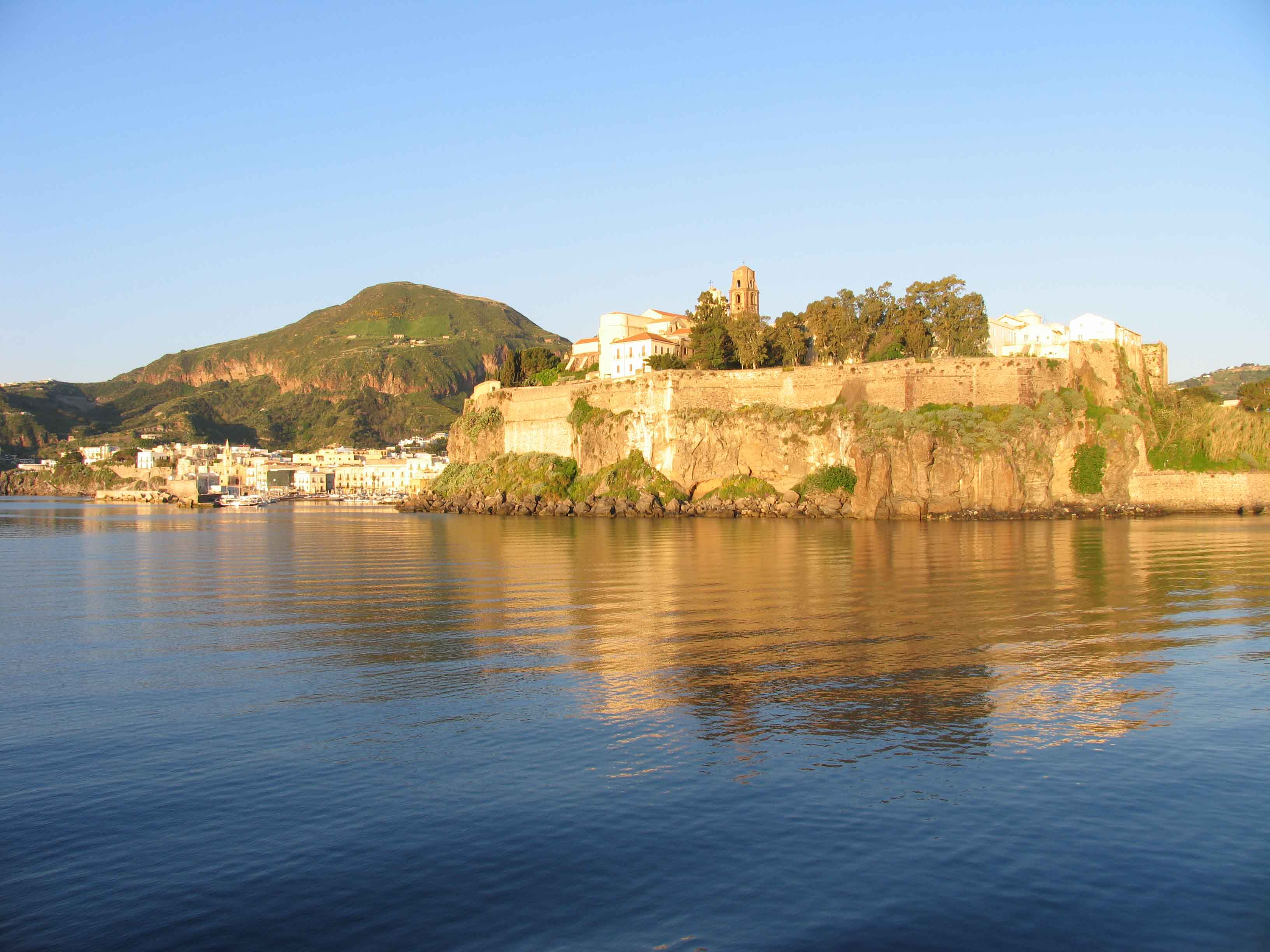 Vista del Castello di Lipari e del Monte Guardia alle sue spalle